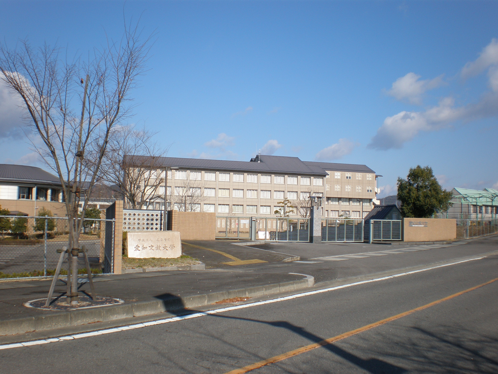 愛知県小牧市にある愛知文教大学